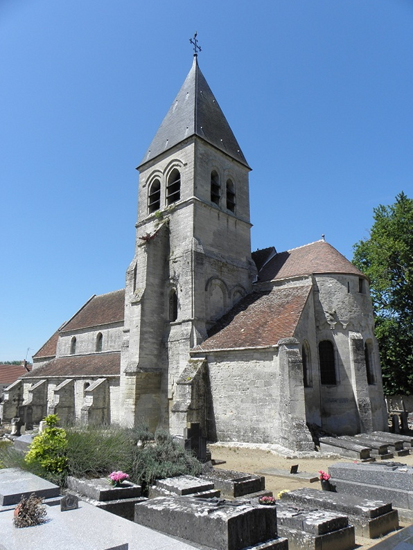 Chevet et flanc sud de l'église Saint-Georges de Presles-et-Thierny (02).